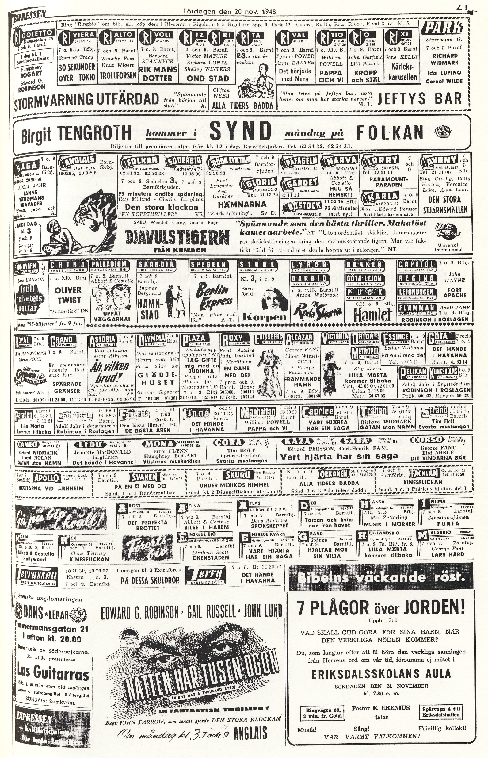 Biografannons för Stockholm lördagen den 20 november i Expressen